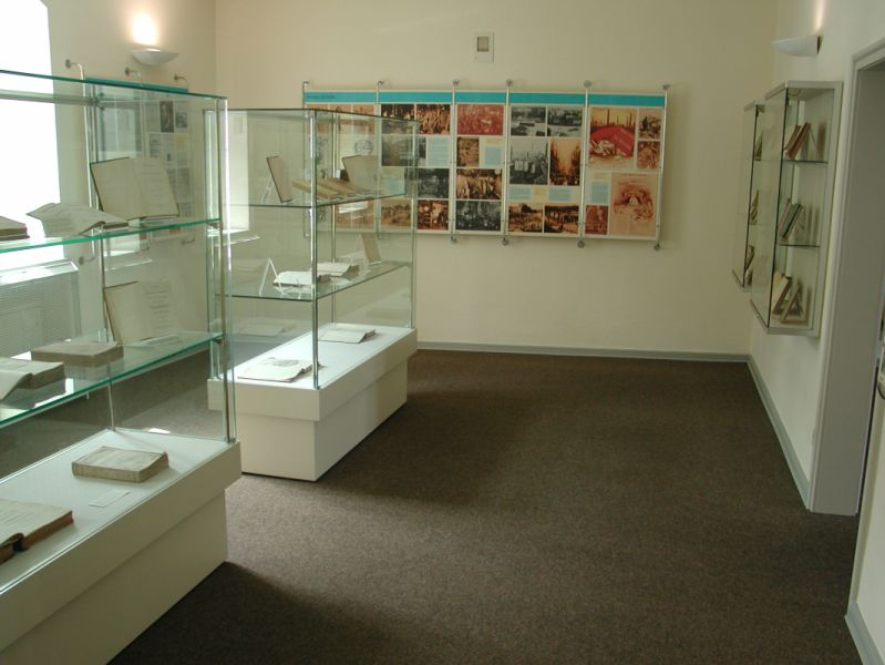 Karl-Marx-Haus in Trier Ausstellungsräume 1.Etage